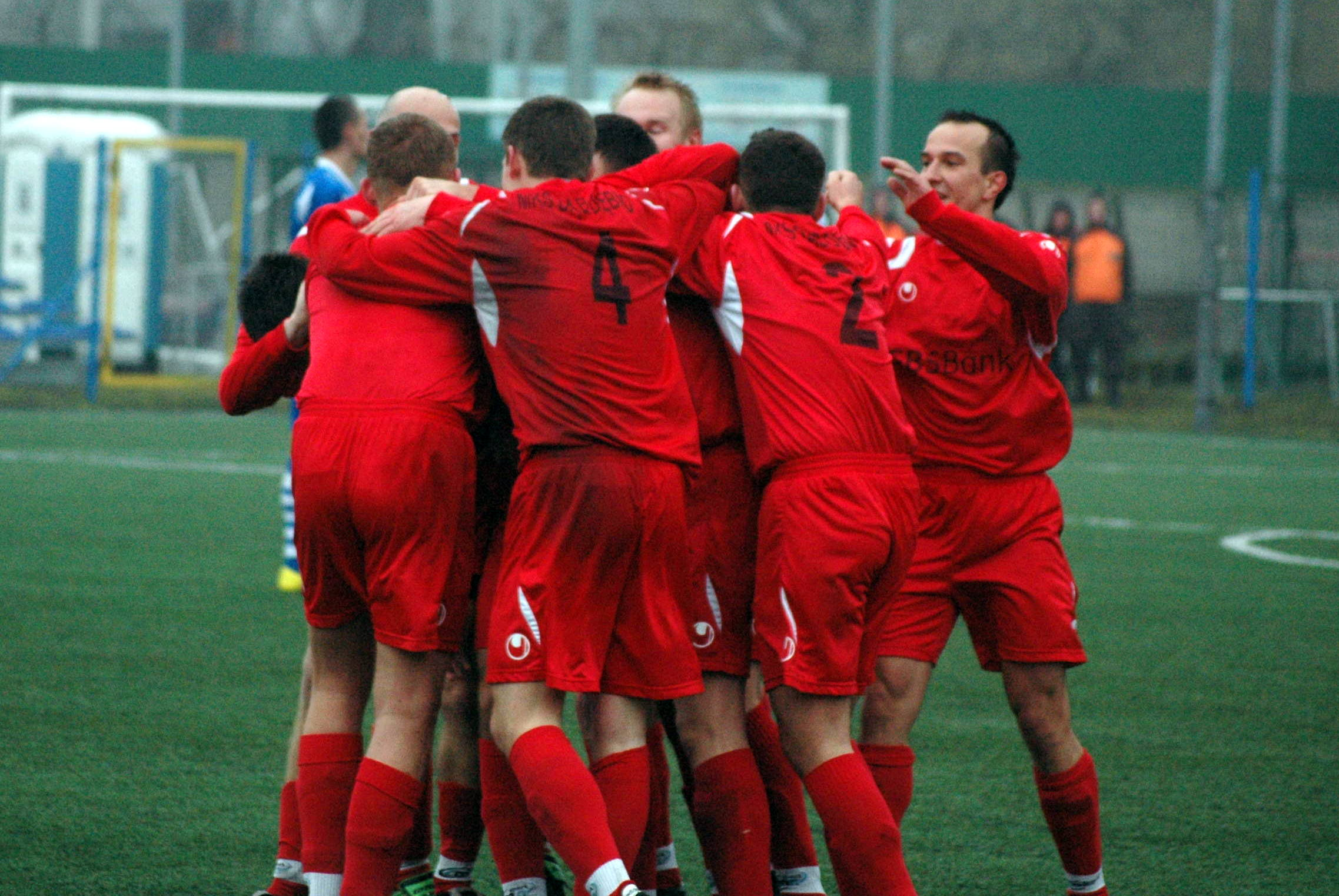 Mecz pomiędzy Kotwicą Kołobrzeg i Dębem Dębno. III liga Bałtycka (2009/2010)